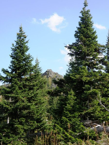 г. Острая